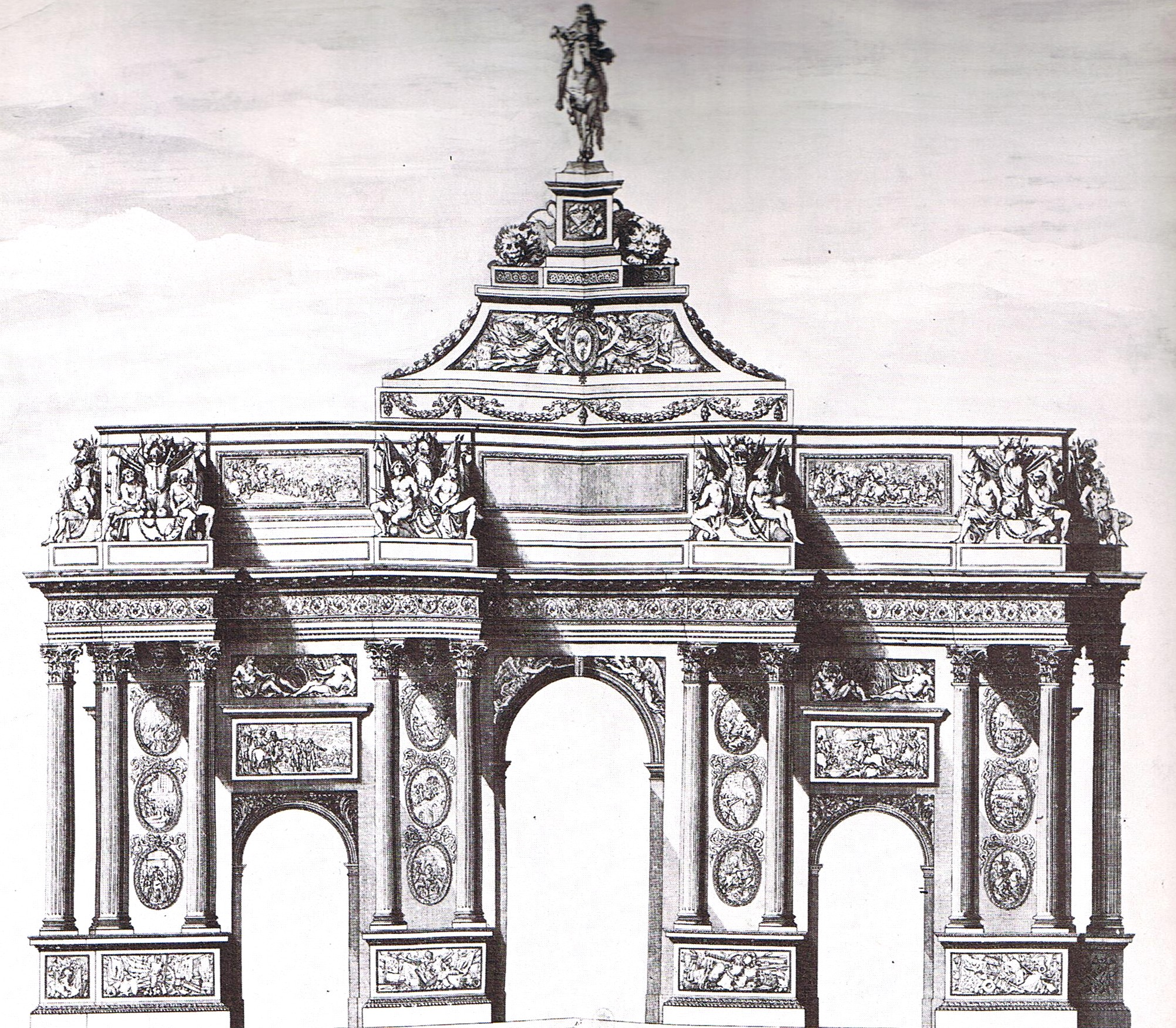 Projet d'arc de triomphe pour la place du Trône (aujourd'hui place de la Nation).